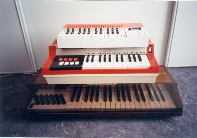 Guides-chant de la marque italienne Bontempi